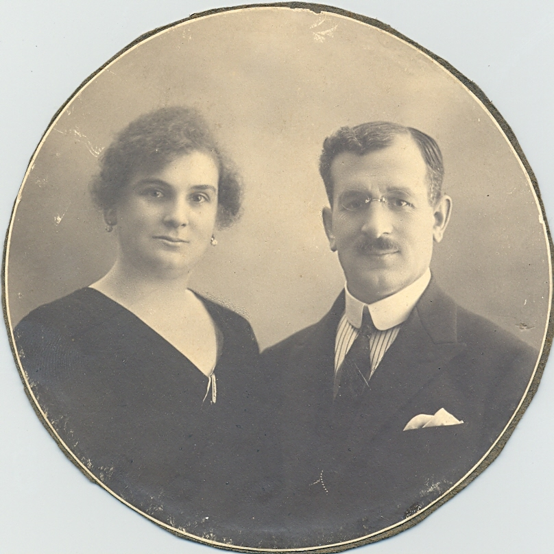 1920 Αντιγόνη & Κάρολος Αλεξανδρίδης